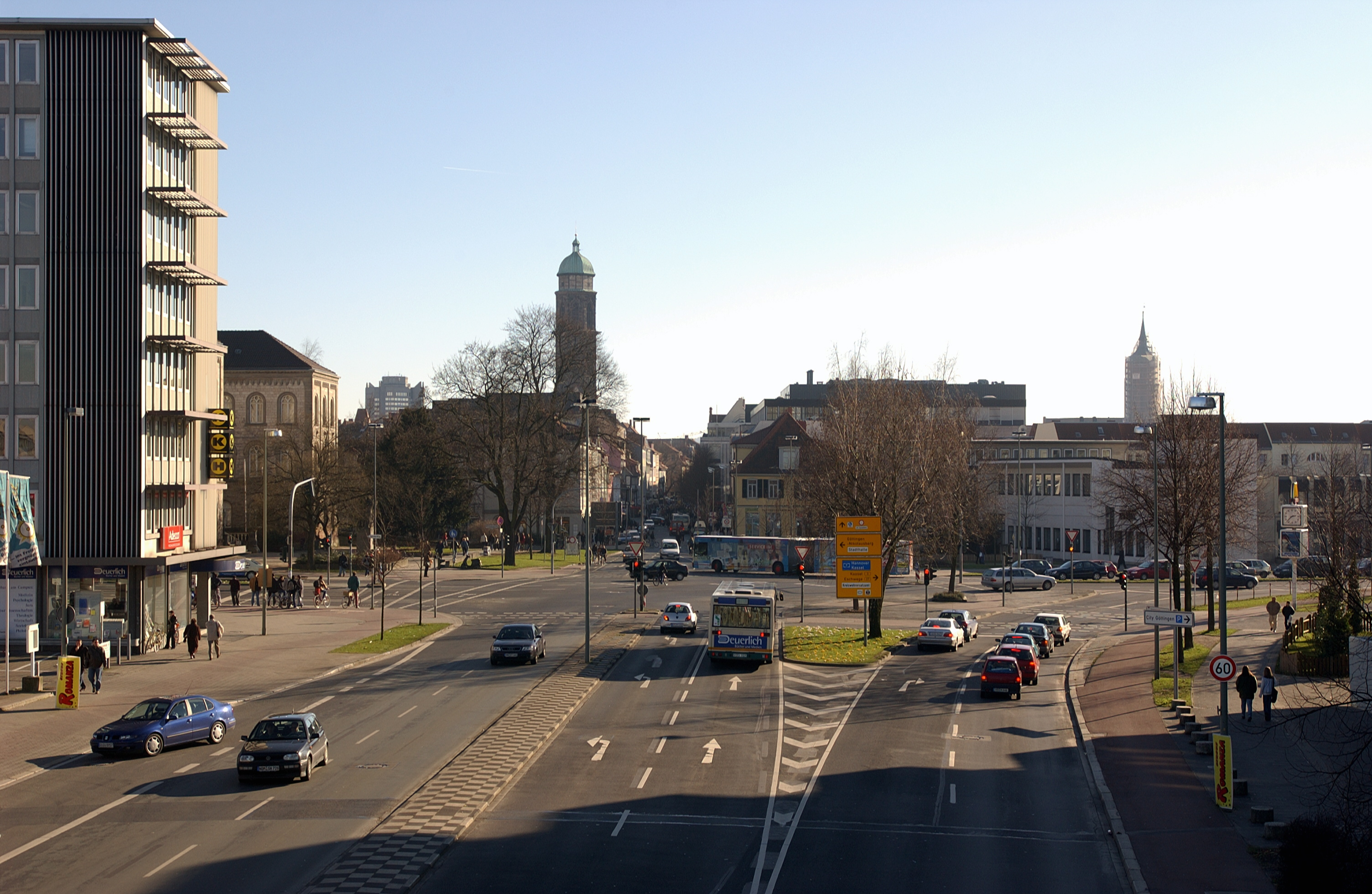 Göttingen, Weender Landstraße, Blick Richtung Süden. Links das Opelhochhaus.